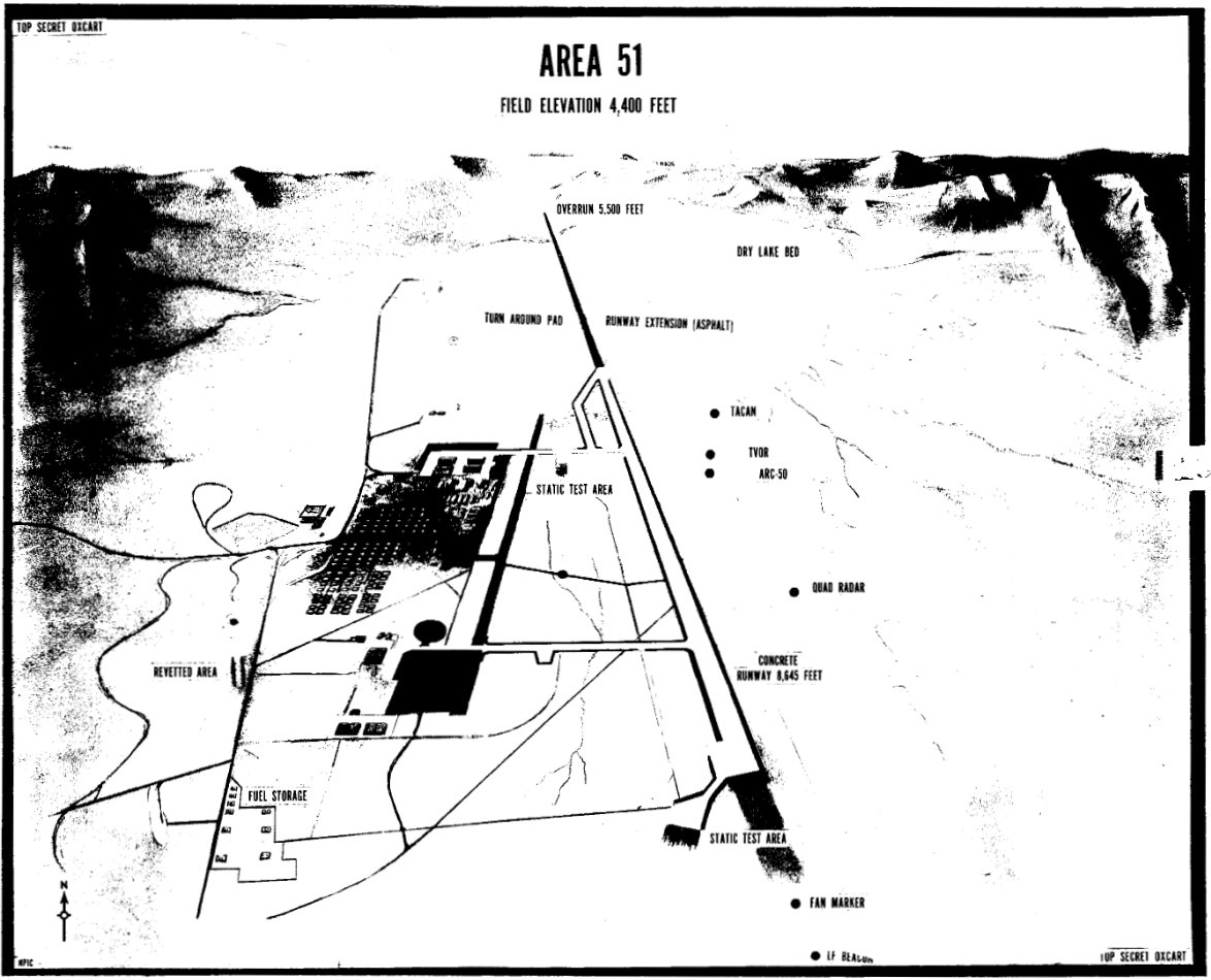 Area 51 declassified diagram.